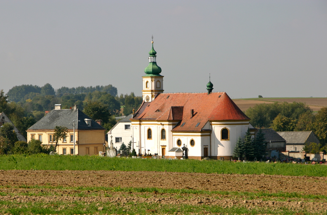 Naczęsławice - kościół parafialny pw. św. Stanisława Biskupa (zabytek nr 1203/66 z 14.03.1966)